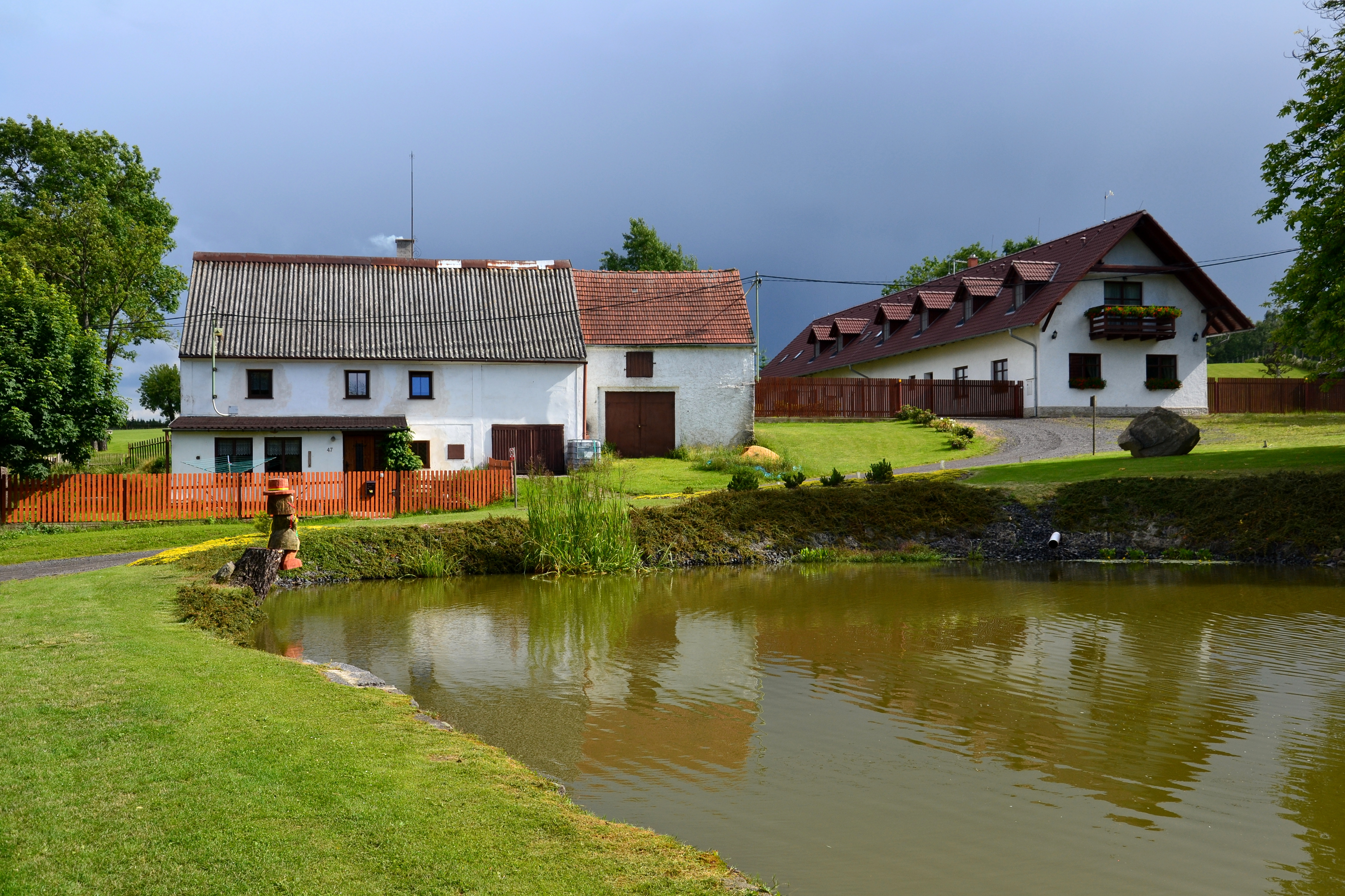 Rybník a domy na návsi